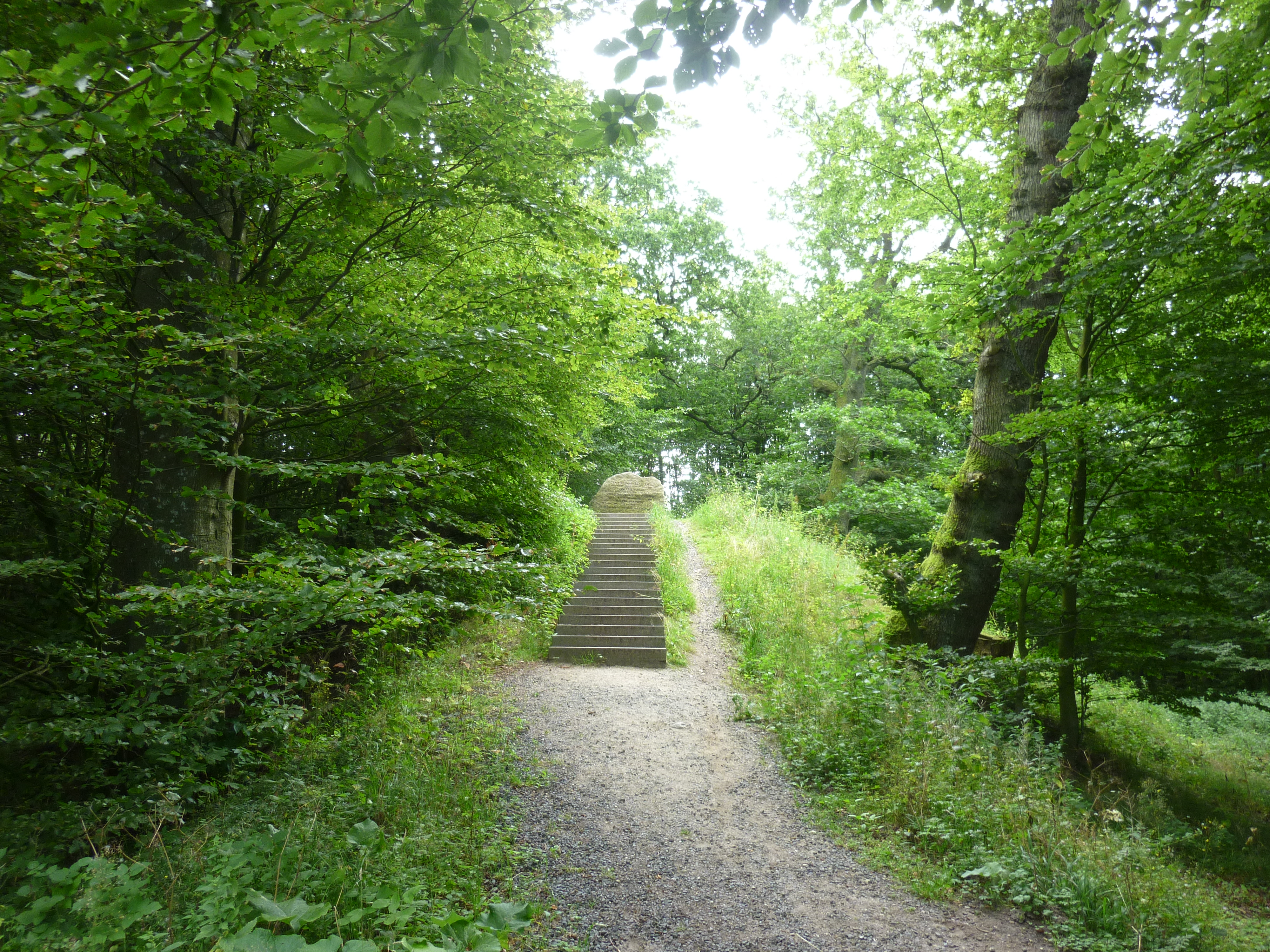 Den kunstige del af Gyldenløves Høj med trappen op til mindestenen